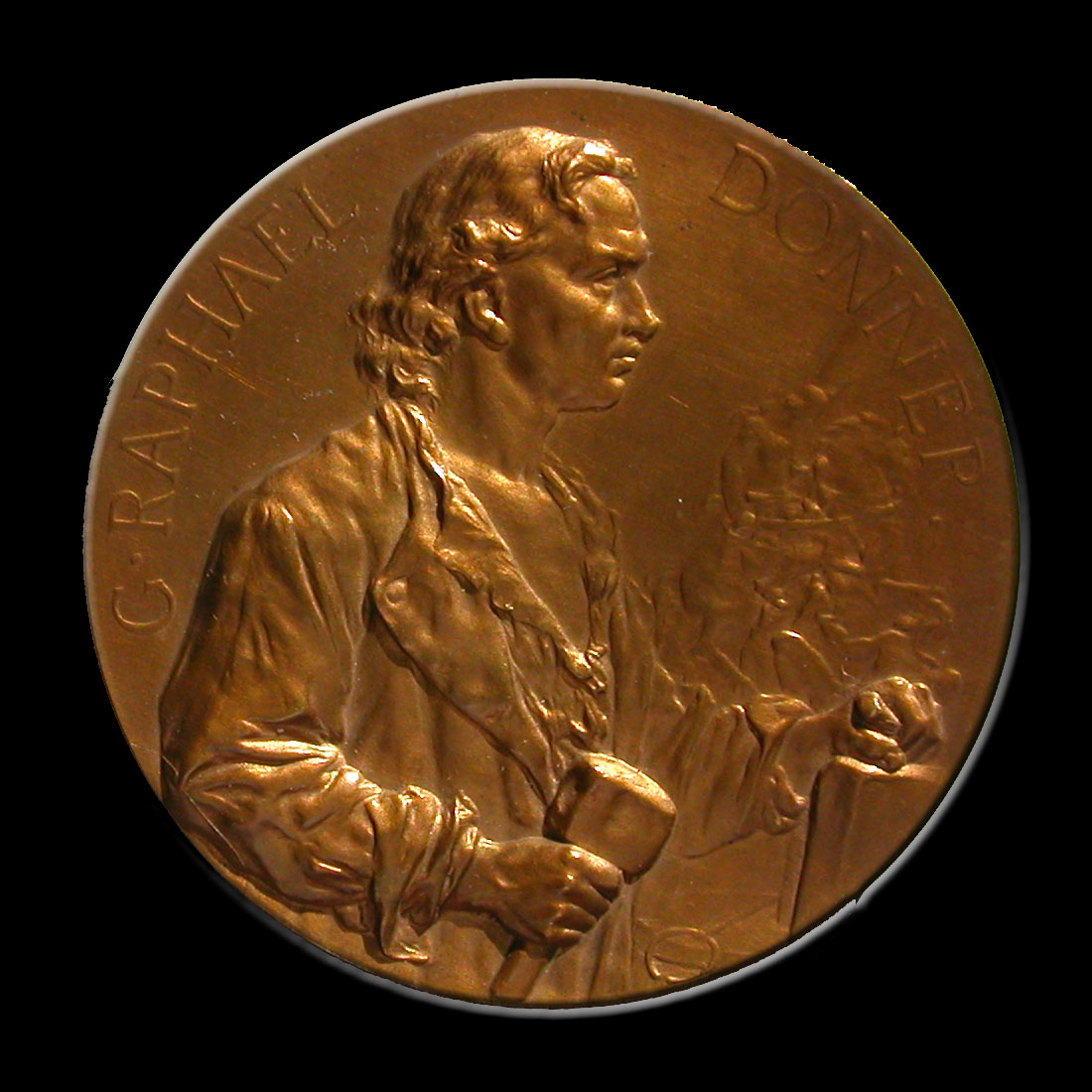 Georg Raphael Donner (1683-1742)